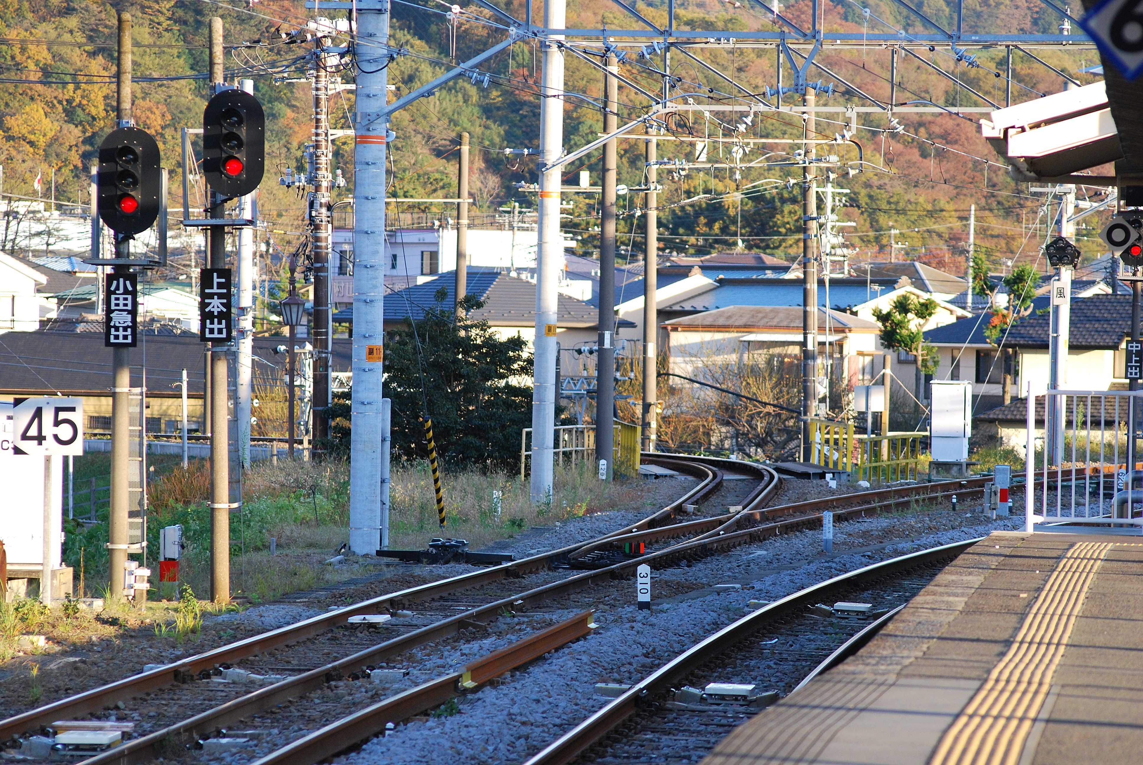 御殿場線松田駅国府津方面にある小田急線への連絡線（左側に分岐している路線）左側の2つの出発信号機があり「小田急出」の表示の出発信号機が進行表示することにより列車が連絡線に入る。